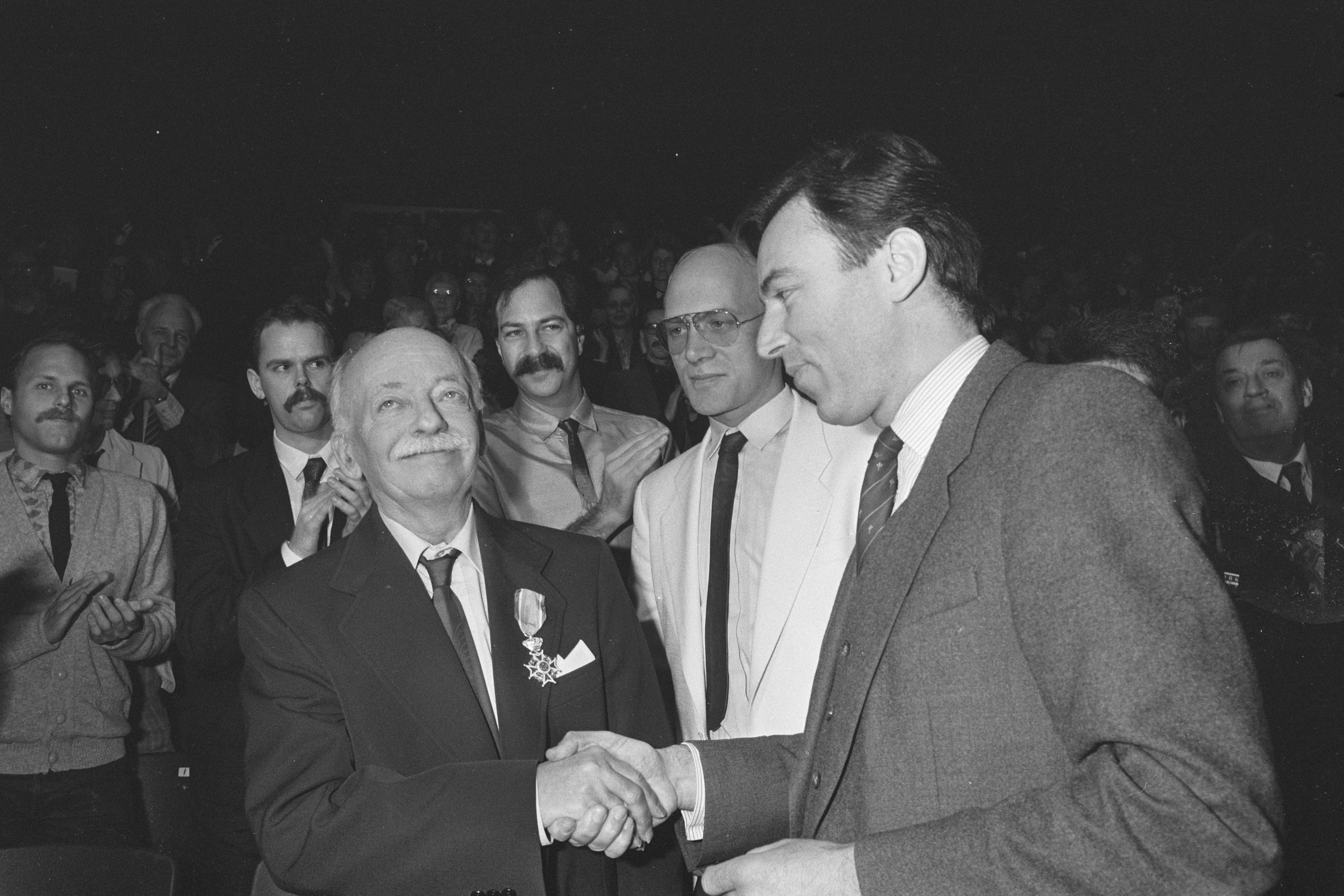 Collectie / Archief : Fotocollectie Anefo Reportage / Serie : [ onbekend ] Beschrijving : (Scheidend) COC-voorzitter N. Engelschman (l) krijgt van minister Brinkman Koninklijke onderscheiding i.v.m. 40-jarig bestaan COC Datum : 7 december 1986 Locatie : Amsterdam, Noord-Holland Trefwoorden : onderscheidingen Persoonsnaam : Brinkman, Elco, Engelschman, Niek Fotograaf : Croes, Rob C. / Anefo Auteursrechthebbende : Nationaal Archief Materiaalsoort : Negatief (zwart/wit) Nummer archiefinventaris : bekijk toegang 2.24.01.05 Bestanddeelnummer : 933-8334 Reacties Geplaatst door COC op 29 maart 2014 - 02:57. (alias: Bob Angelo)